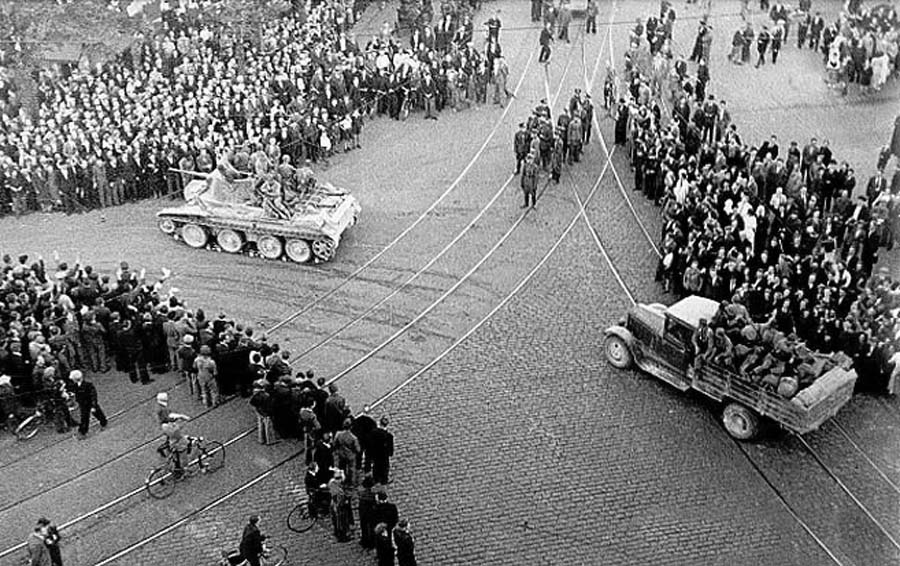 A Soviet BT Tank with a truck and troops in the center of Riga, 1940. Source: [1]